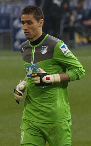 Koen Casteels with Hoffenheim in 2014